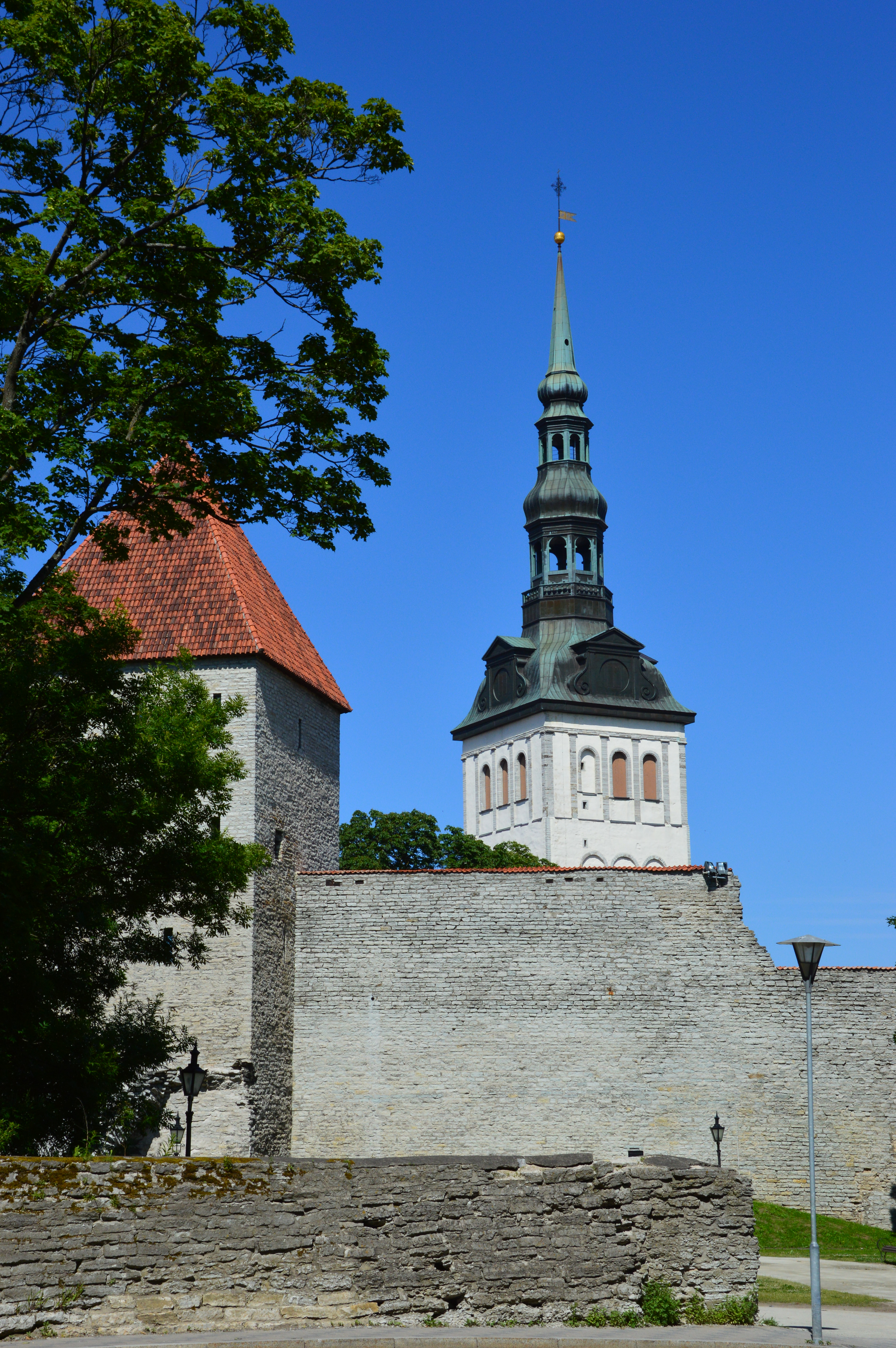 Niguliste kirik Harjumäelt